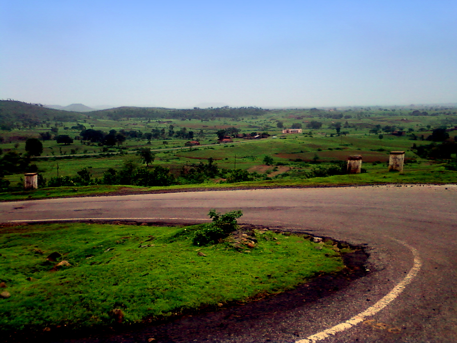 प्रतापगढ़-बांसवाडा सड़क